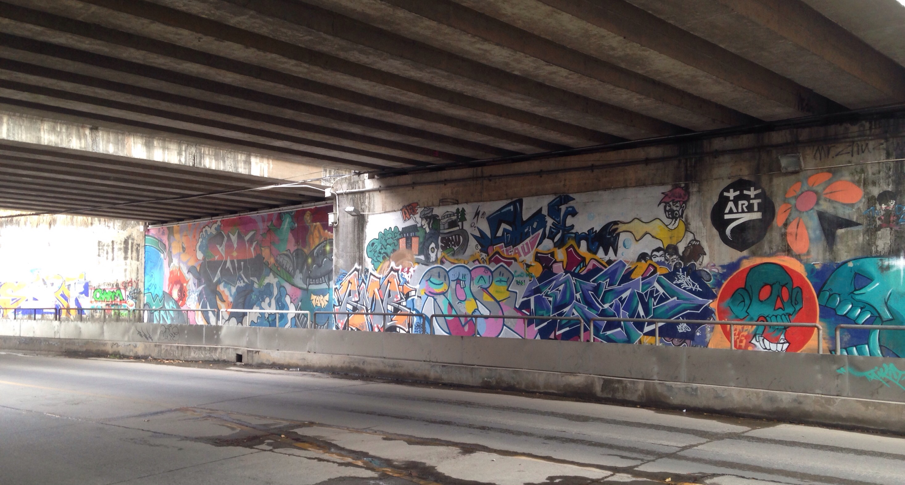 华南农业大学校内的涂鸦涵道